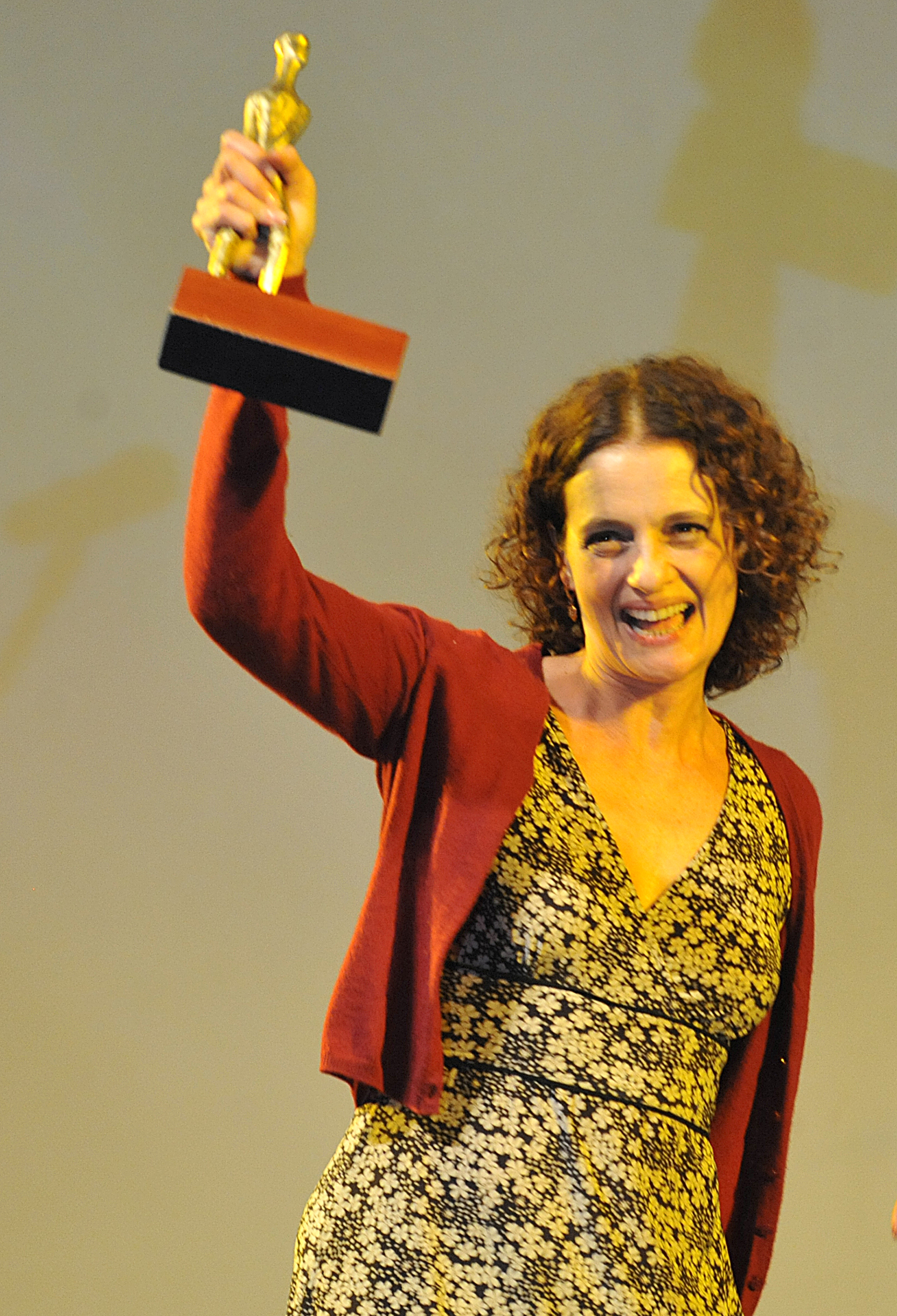 A atriz brasileira Denise Fraga recebe prêmio de melhor atriz, categoria longa-metragem, pelo filme Hoje, de Tata Amaral, no 44º Festival de Brasília do Cinema Brasileiro.